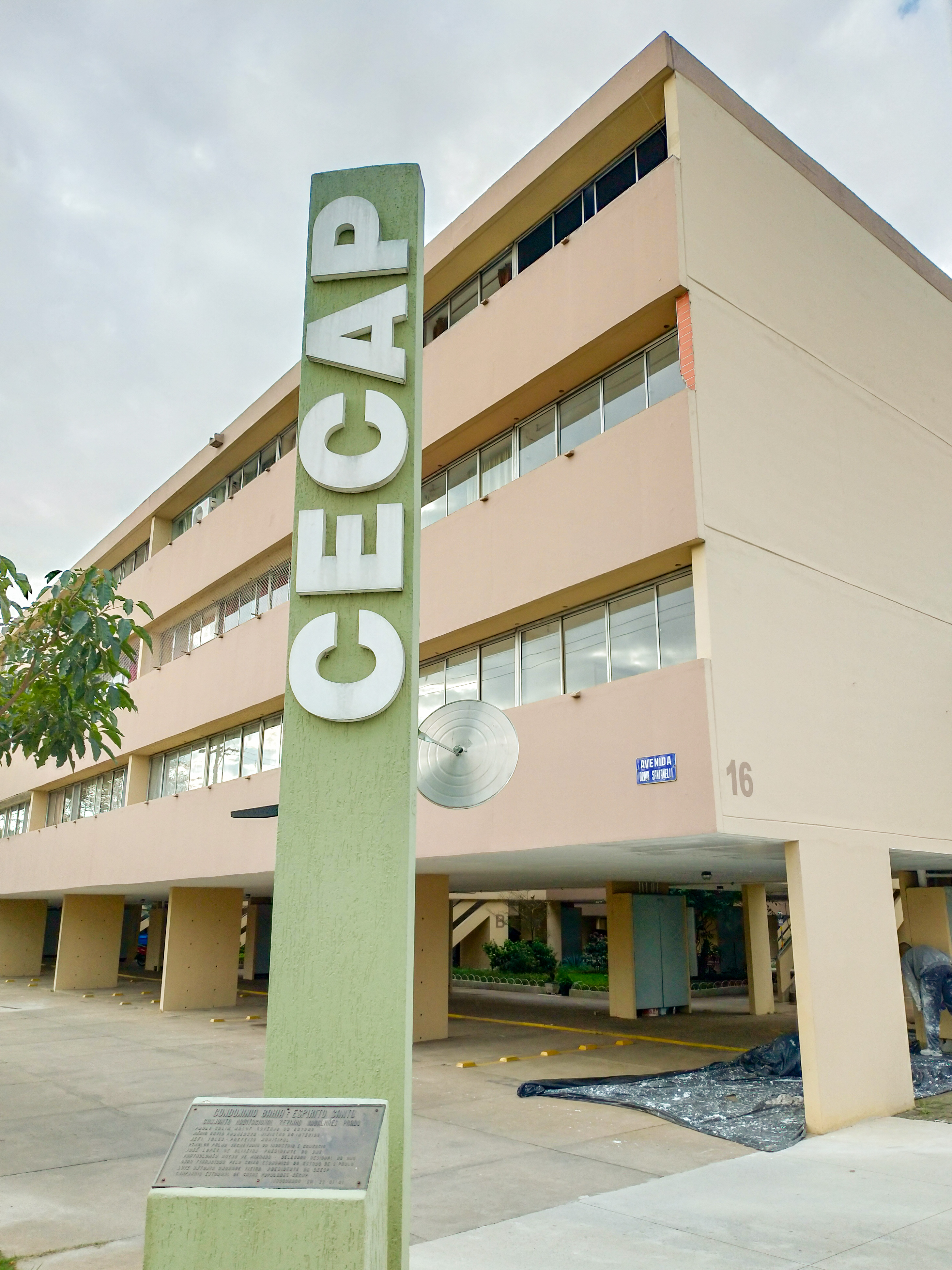 Maratona de produção e edição de imagens, Sesc Guarulhos 2019